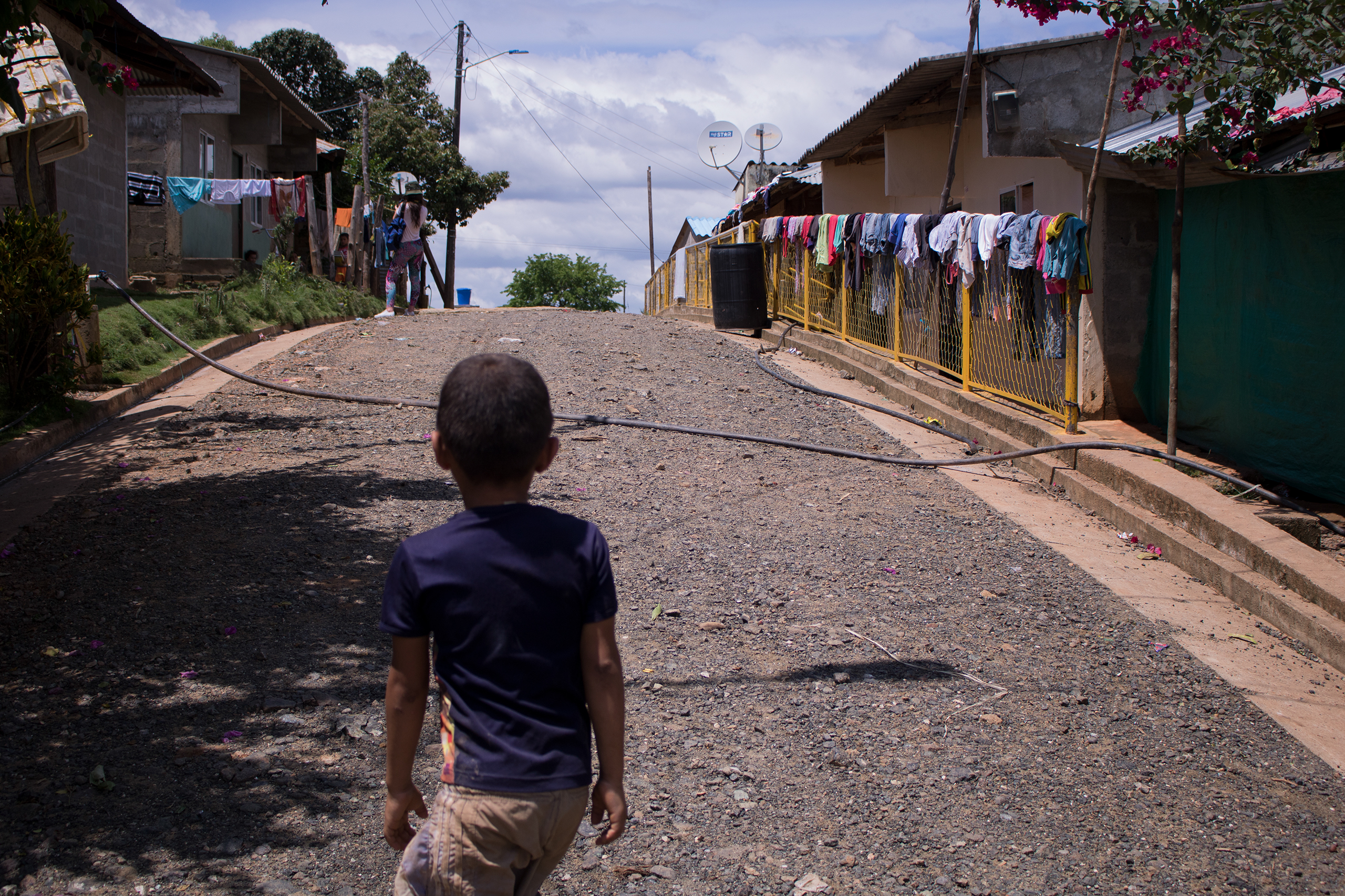 Niño caminando por Pueblo flechas